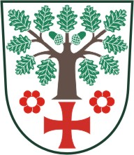 Horní Dubňany /okres Znojmo/